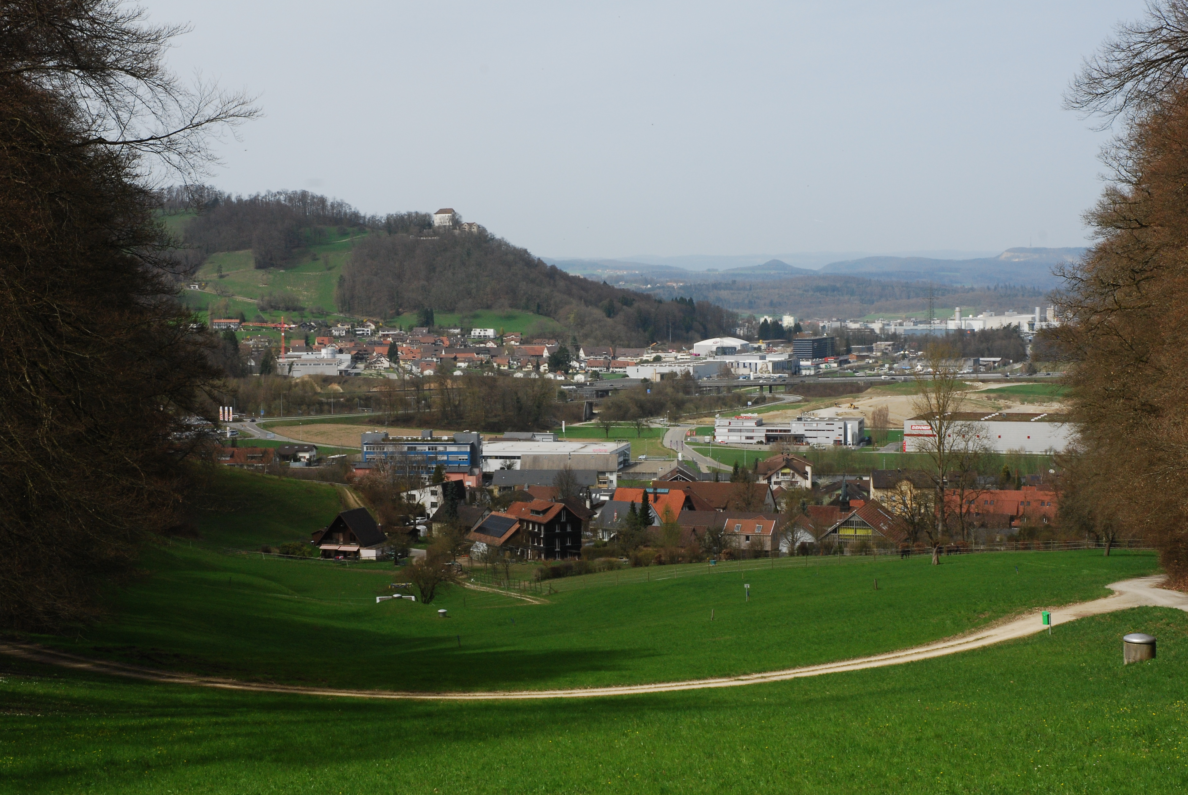 Im Vordergrund Mägenwil von der Obermatt gesehen, in der Mitte Brunegg, darüber Schloss Brunegg